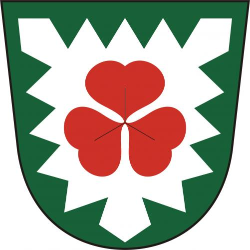 Znak, Kopřivná, okres Šumperk